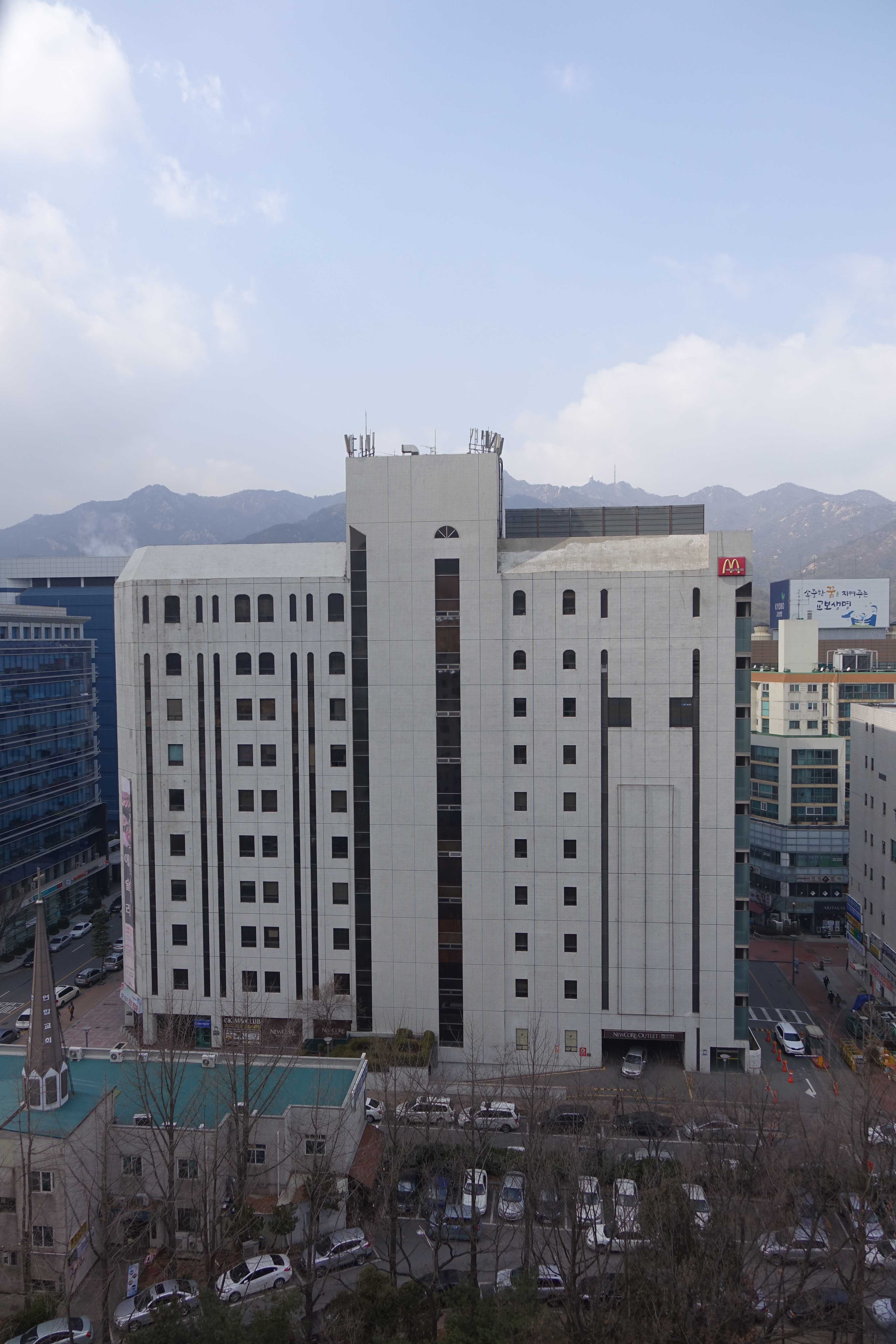 2015년 3월 경기도 과천시